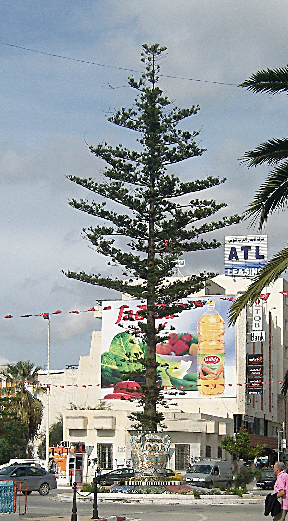 Monument de Ville de Nabeul (Tunisie), arbre inscrit dans une jarre en porcelaine